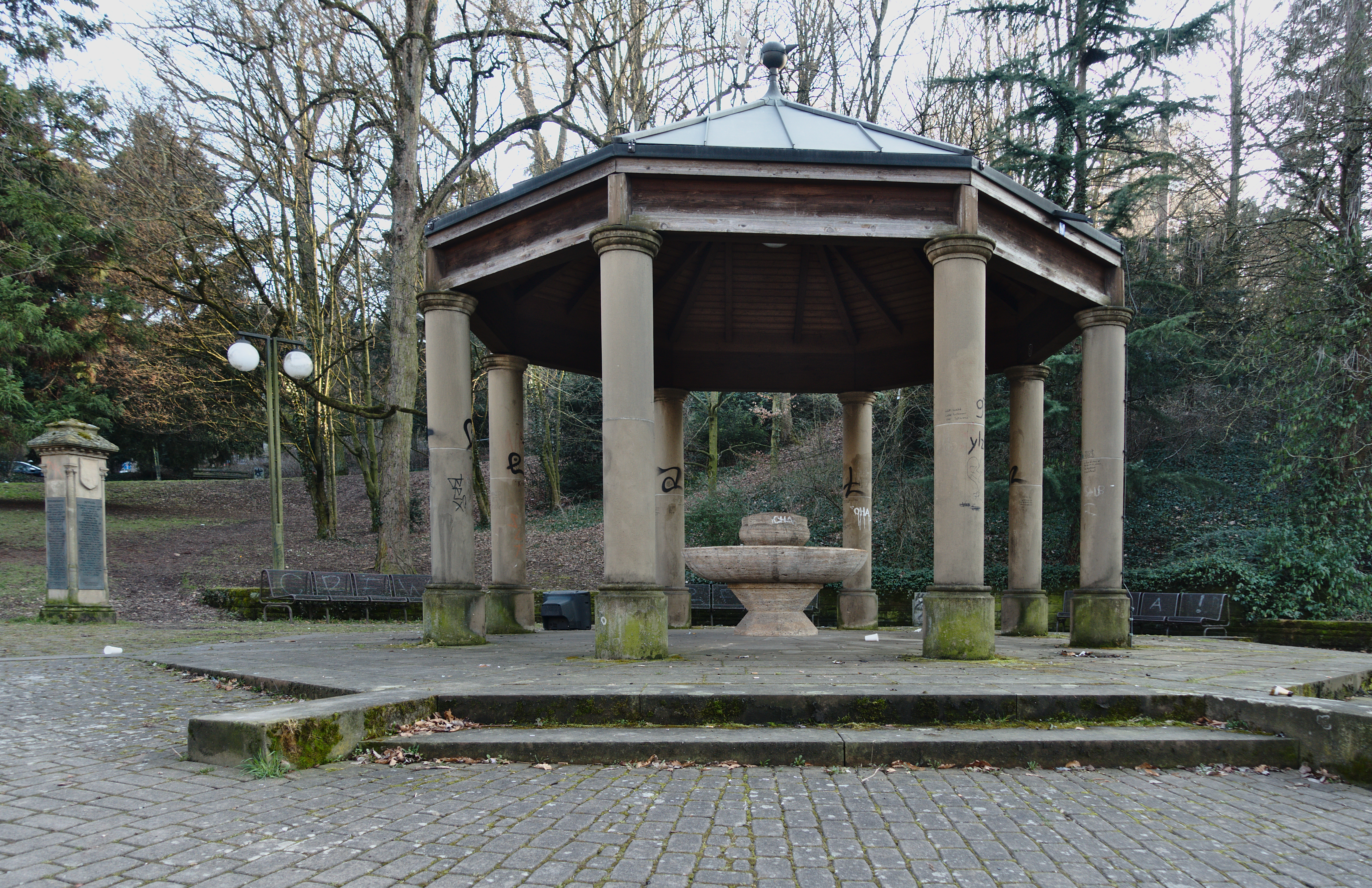 Bopserbrunnen mit Denkmal, Stuttgart. 1822, 1882–1884. Geschützt nach § 2 DSchG